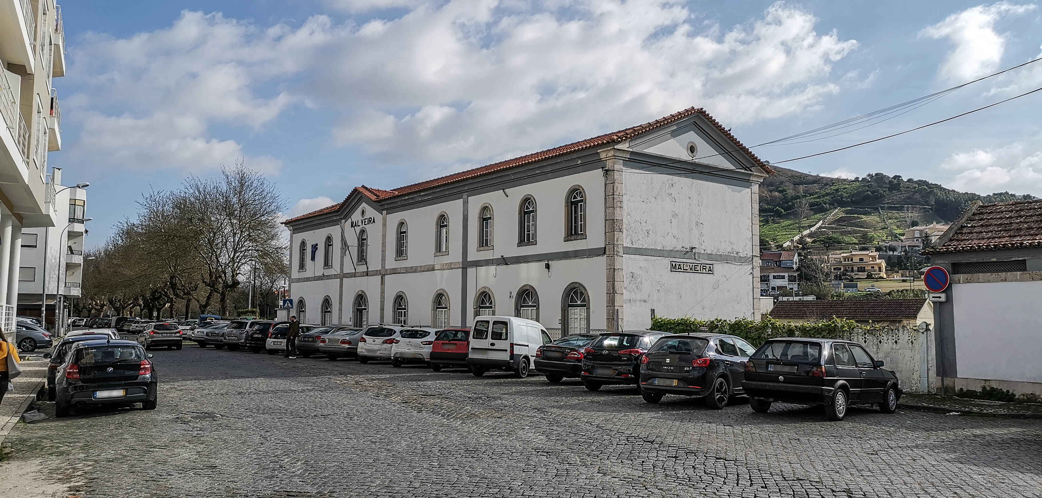 Vista do edifício da Rua dos Bombeiros Voluntários.